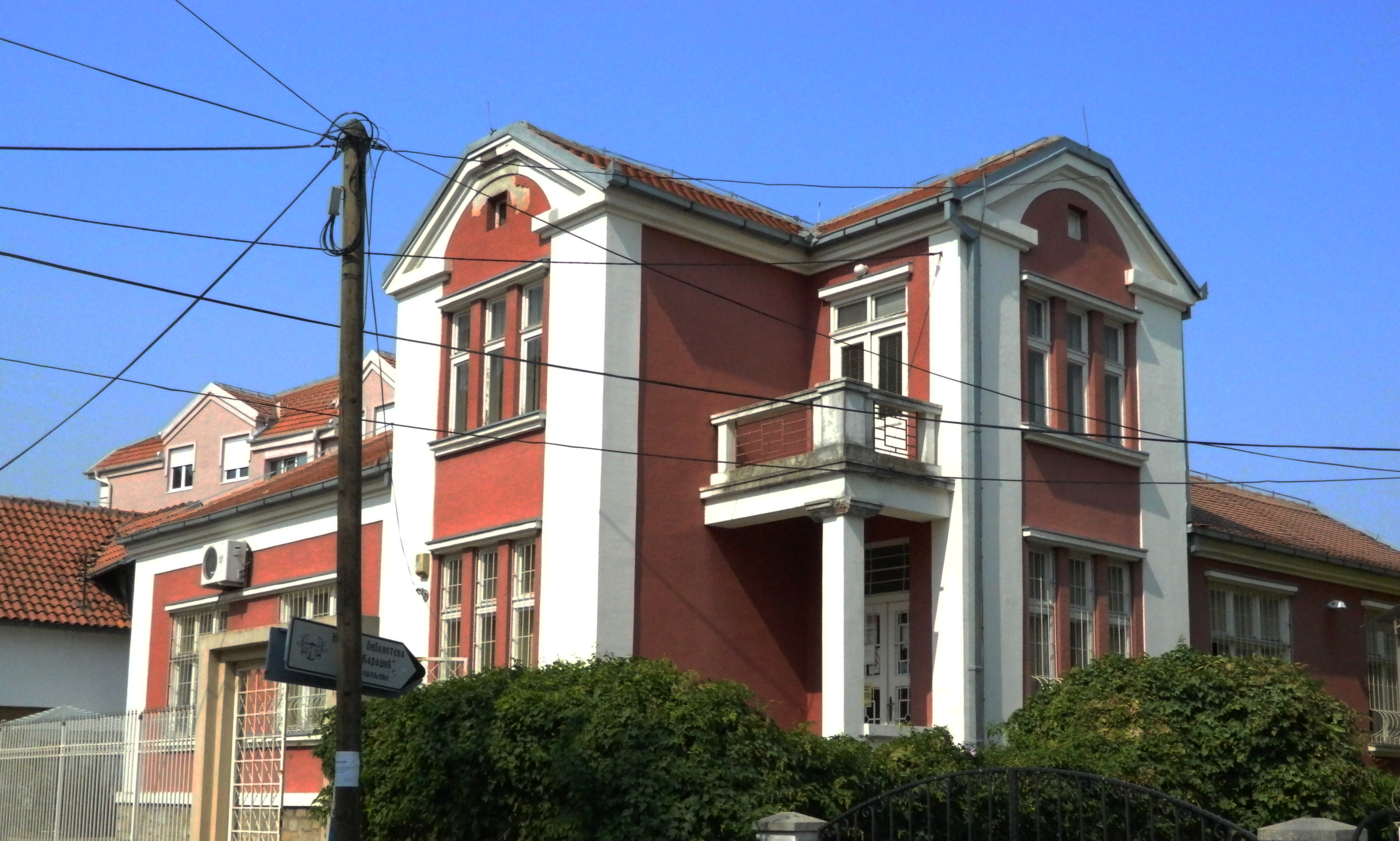 kuća legat, ulica Milovana Glišića 44